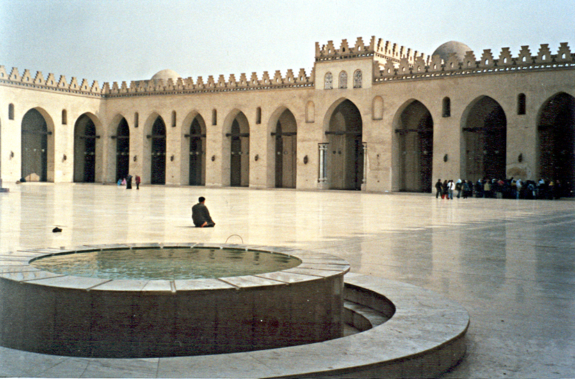 Cour de la Mosquée Al-Hakim